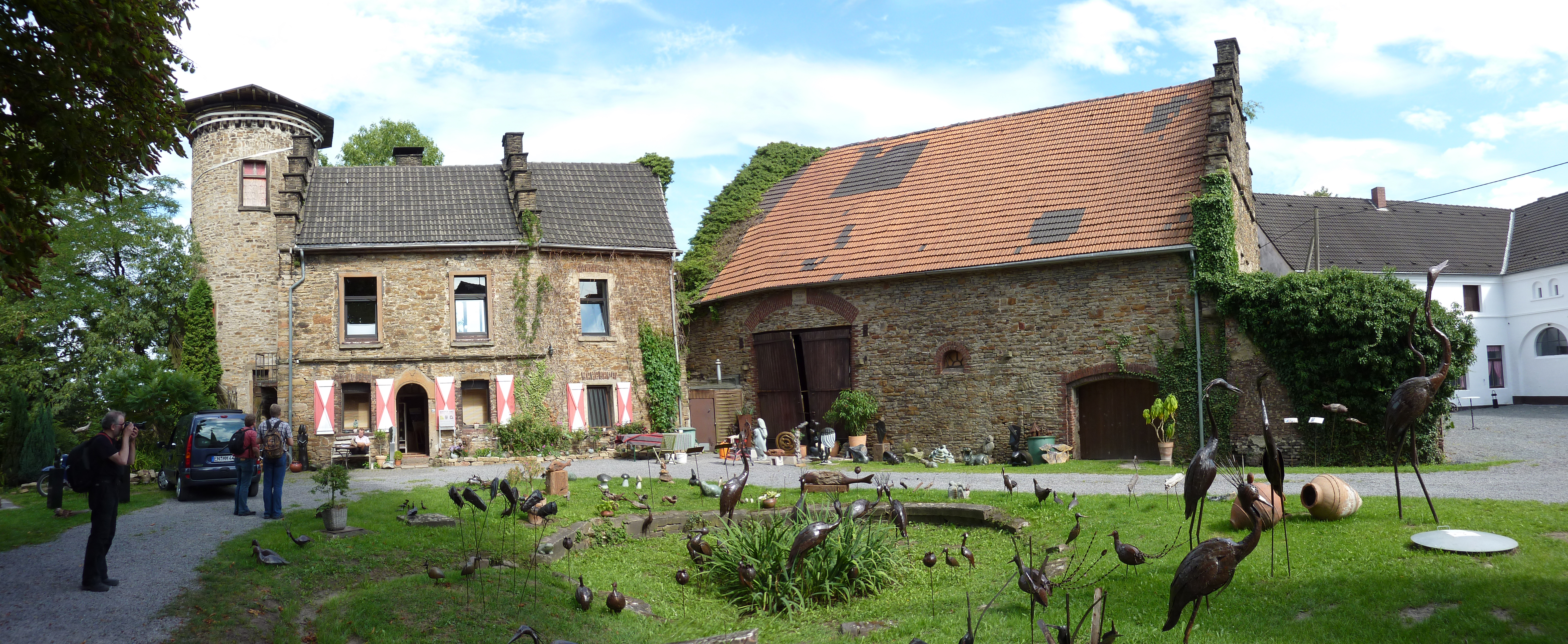 Schloss Steinhausen, WittenThis is a photograph of an architectural monument., no. 230